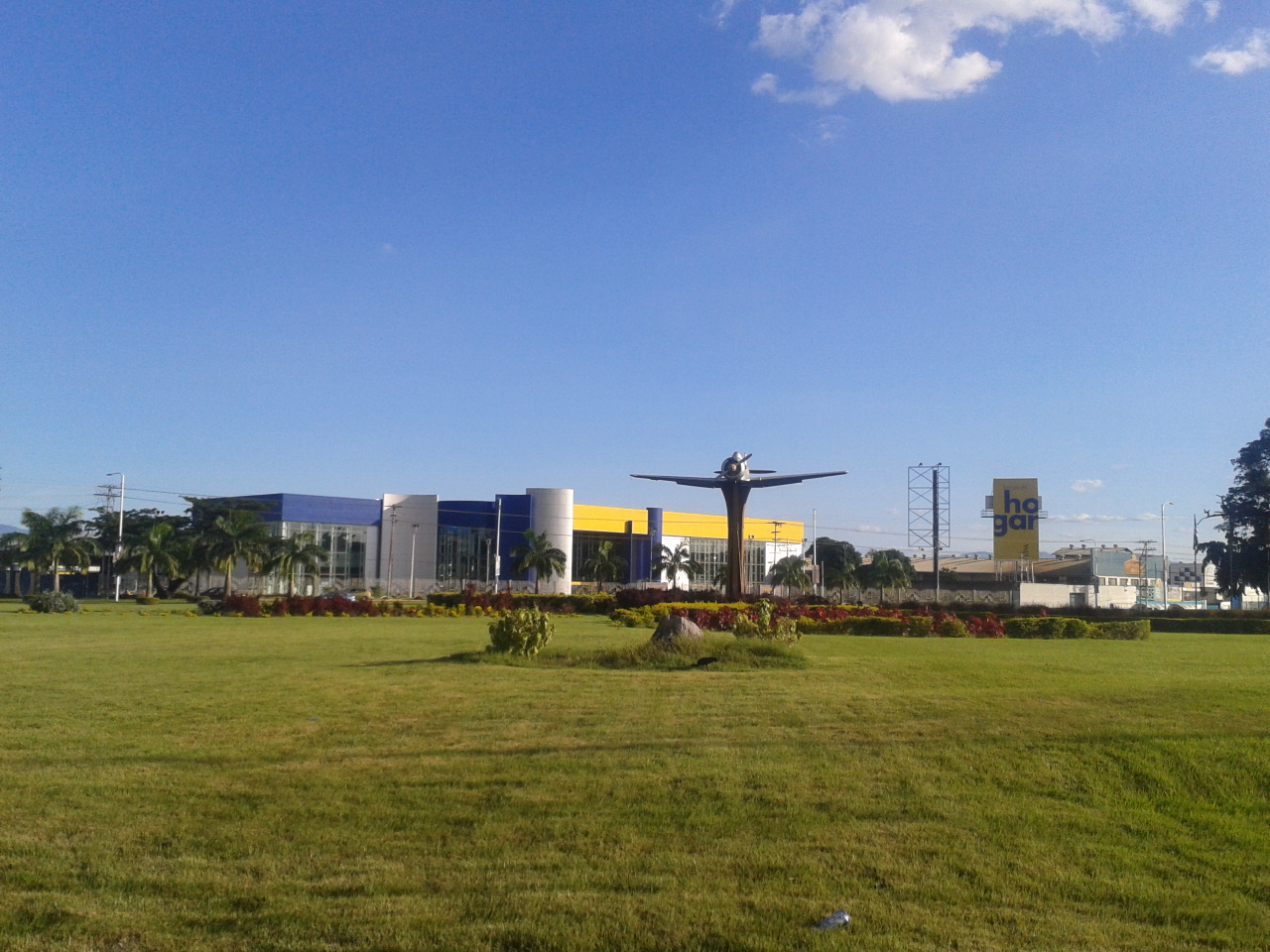 Redoma del Avión, estado Aragua